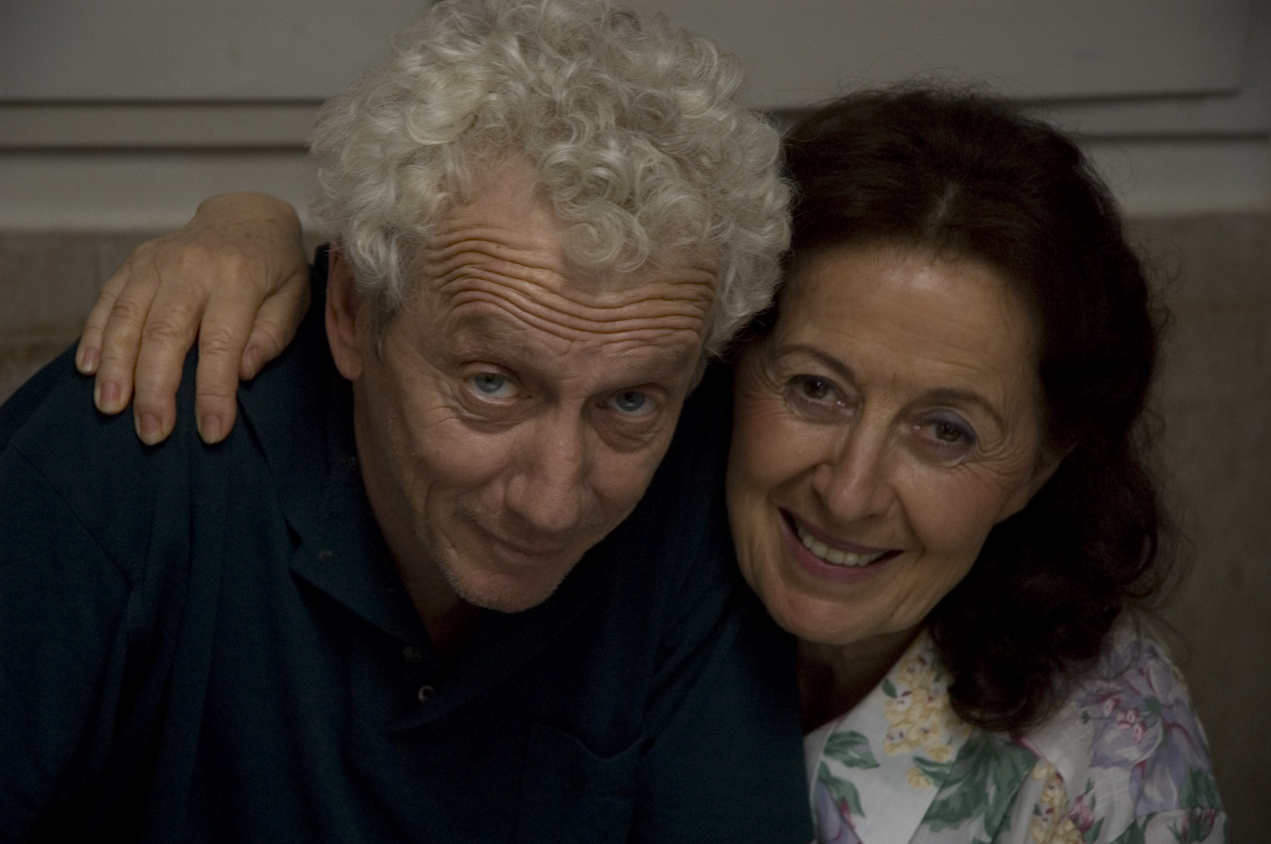 ריטה זהר ומוני מושונוב בסרט "בדרך אל החתולים", 2009